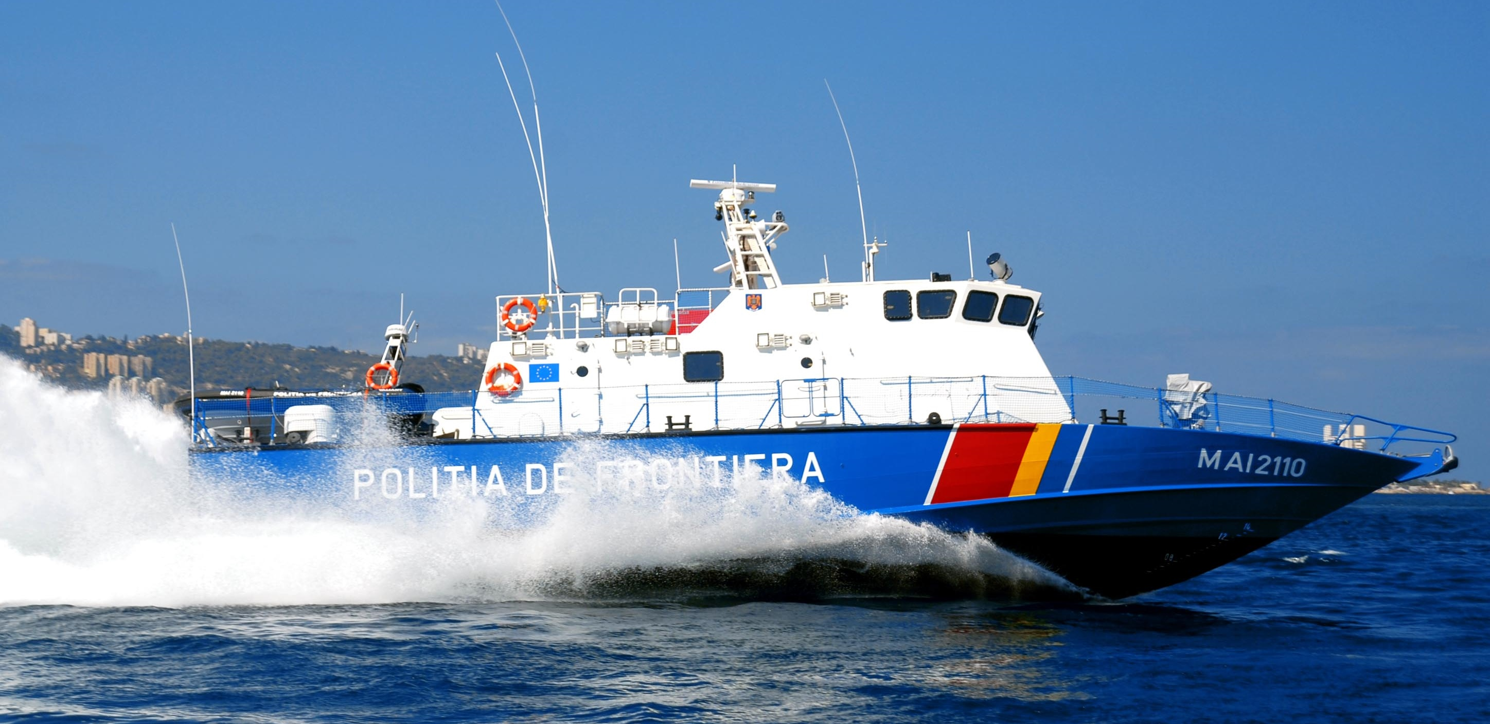 ספינה לבטחון שוטף מסדרת שלדג סימן מתוצרת מספנות ישראל